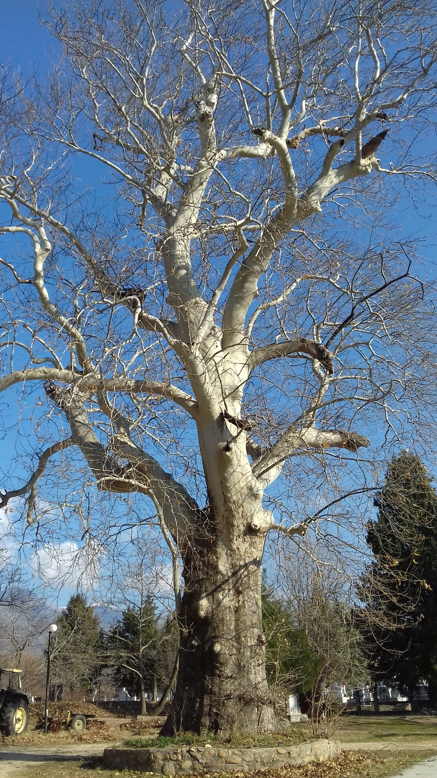 Αιωνόβιος Πλάτανος στον οικισμό Καβαλλάρη Κιλκίς